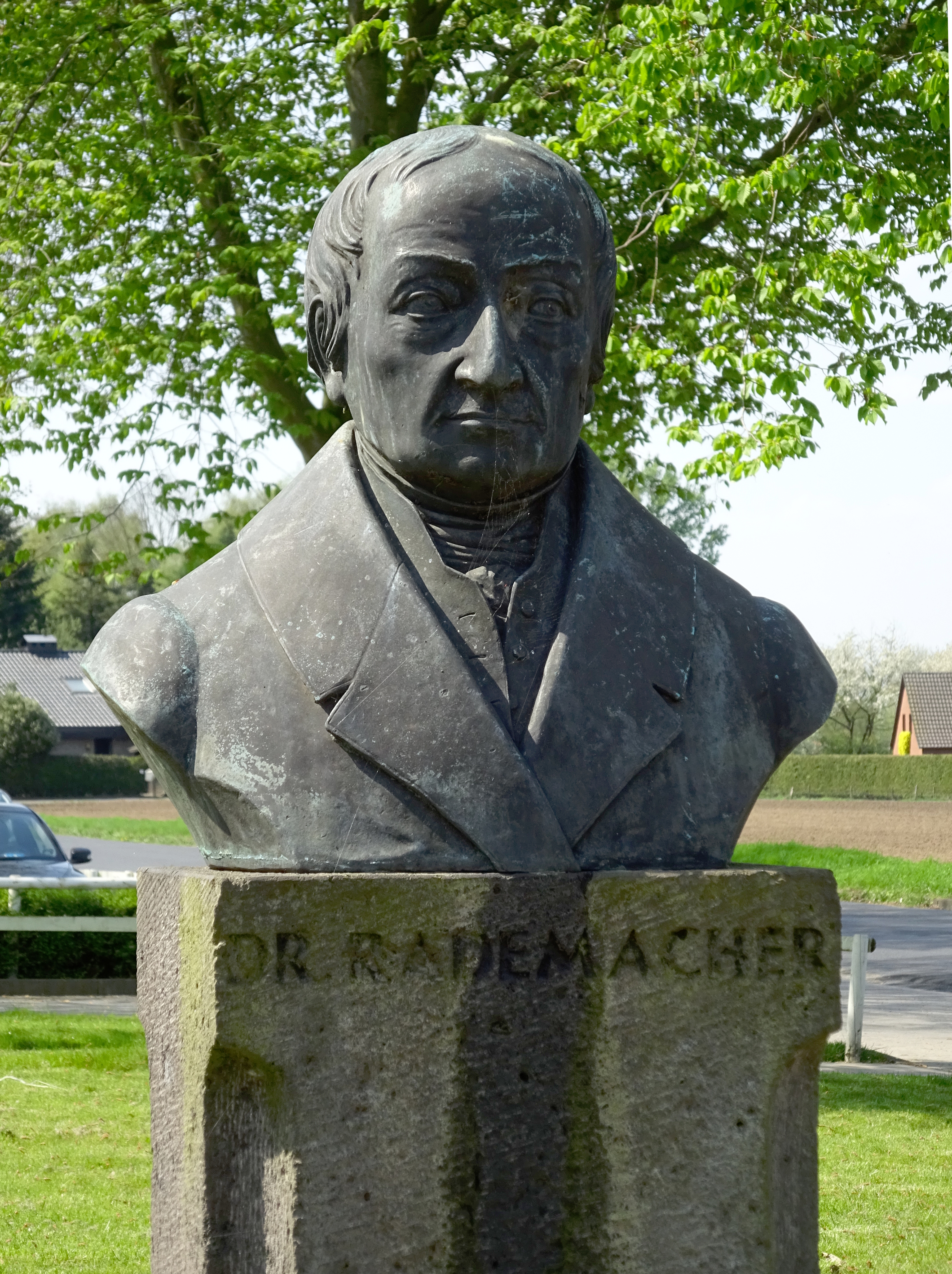 Johann Gottfried Rademacher. Portretbuste in Goch.